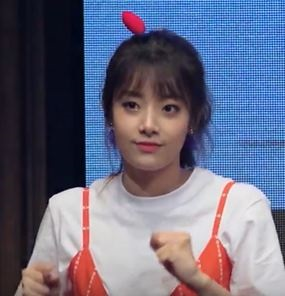 180610 대교타워 아이레벨홀 팬사인회